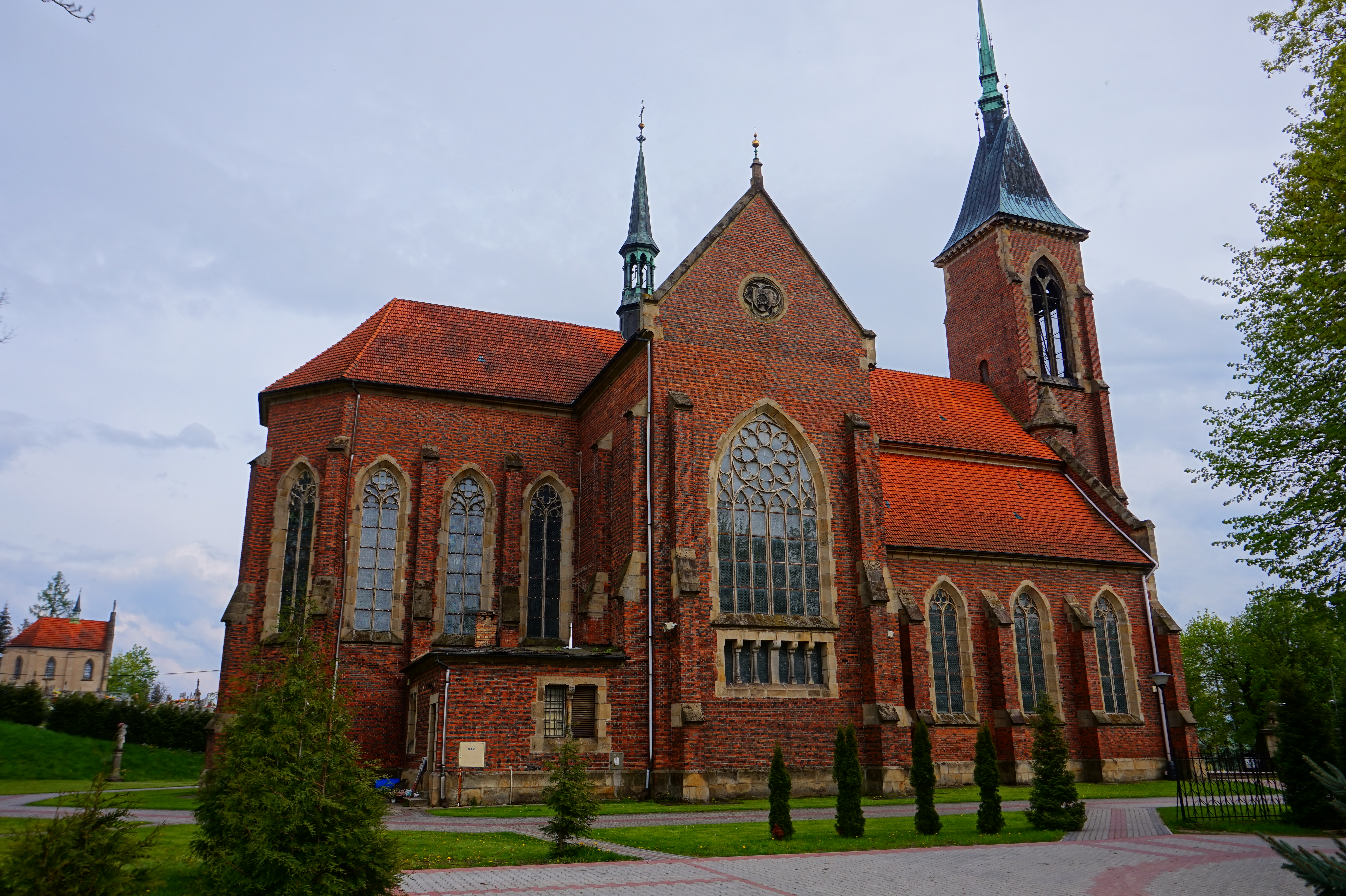 Kościół pw. Św. Stanisława Biskupa we wsi Dobrzechów, pow. strzyżowski